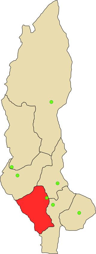 Provincia de Luya en departamento Amazonas